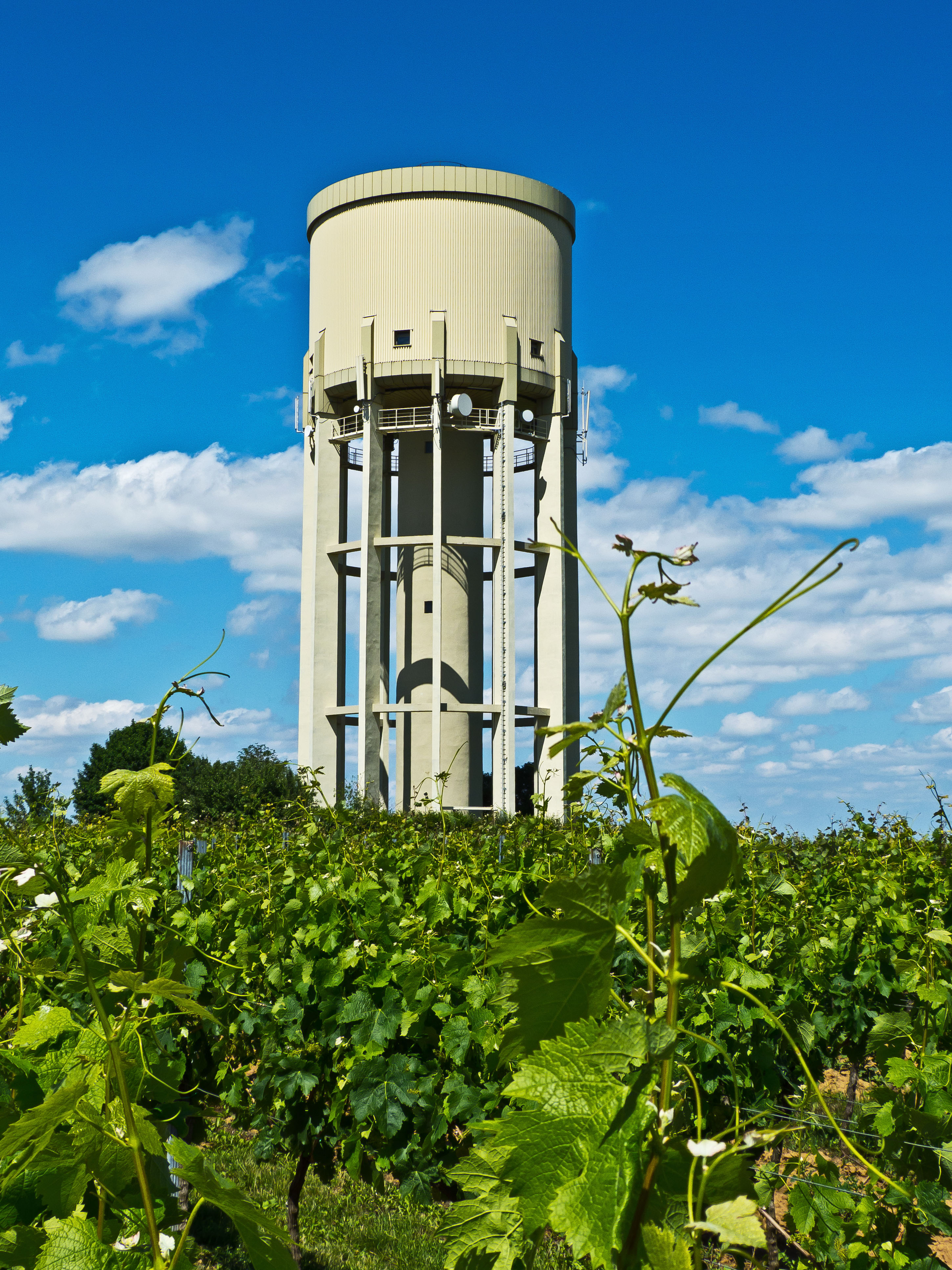 Wasserturm, nordöstlich von Duttweiler, auf dem Trappenberg, Eigentümer: Gemeinde Hassloch